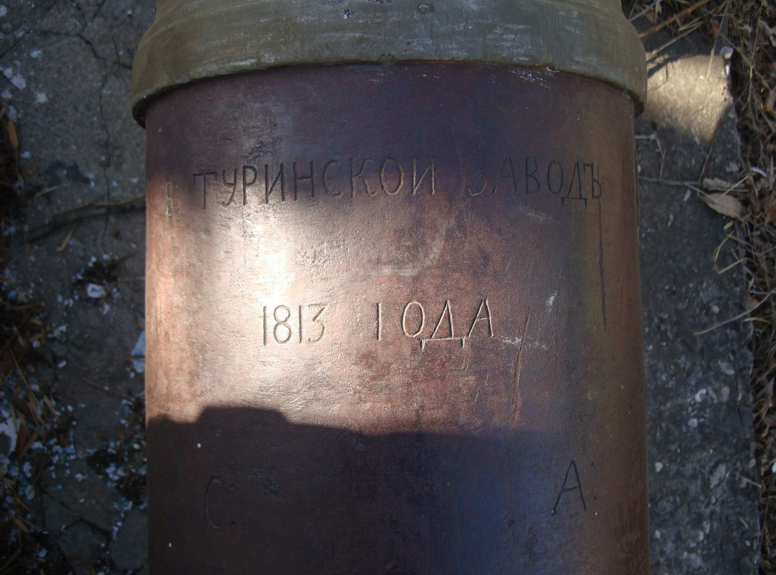 Лакский район, с. Хури